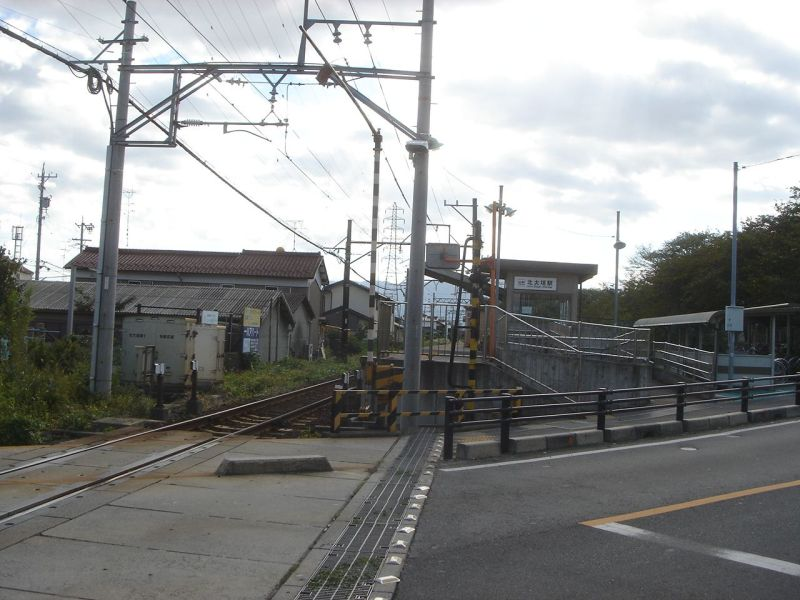 北大垣駅